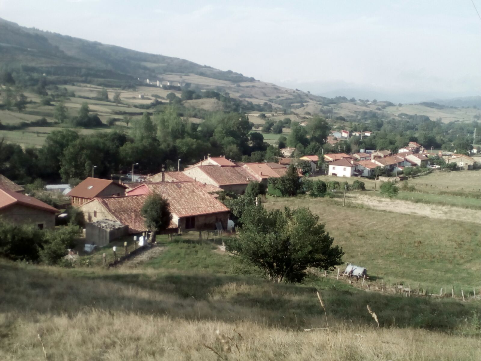 Vista de la localidad cántabra de Pie de Concha.